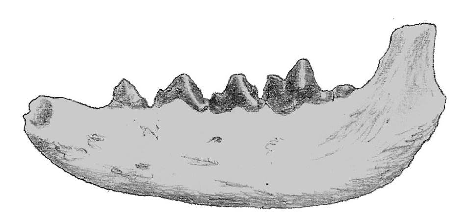 Palaeoprionodon lamandini